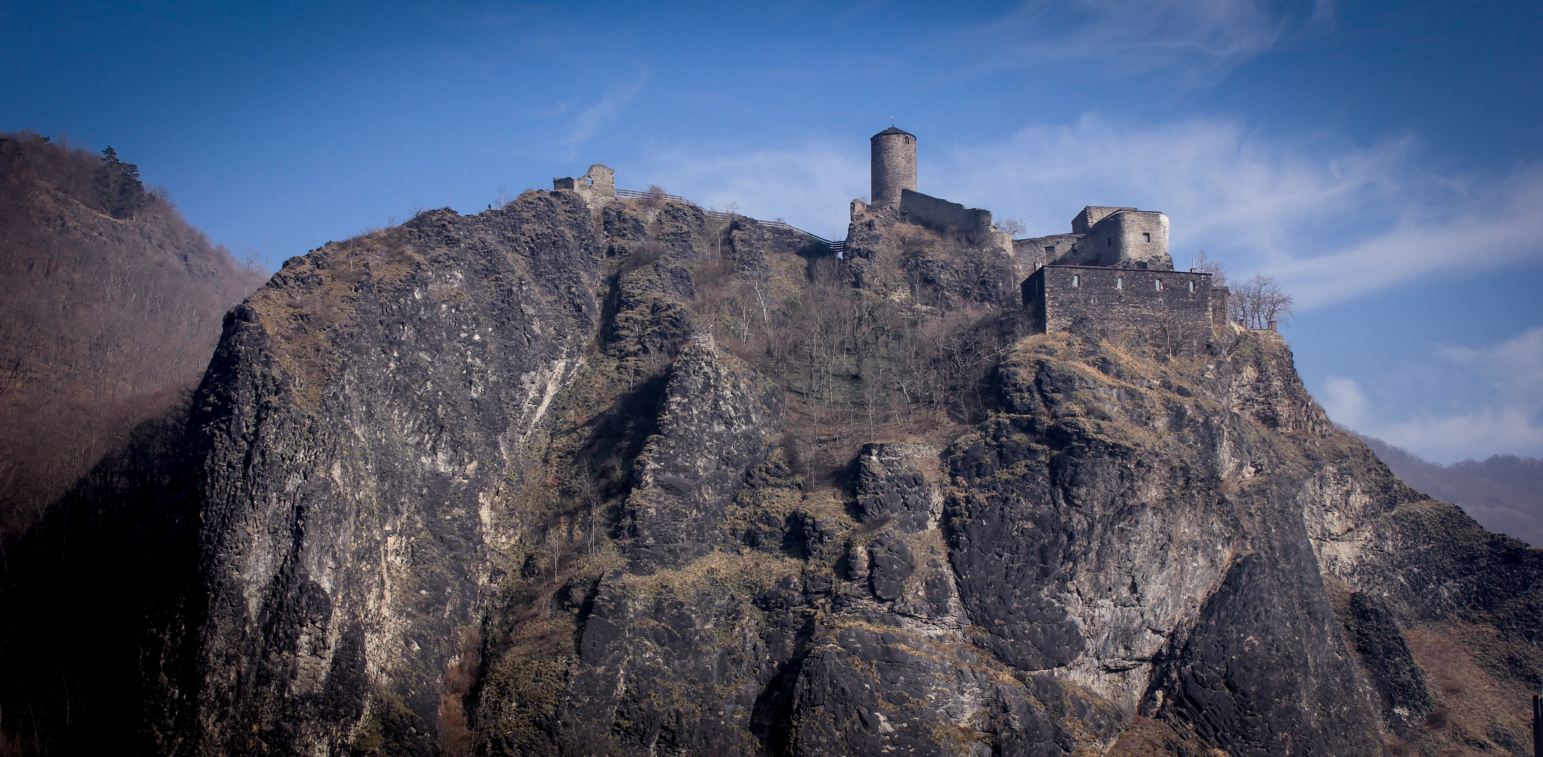 Burg Strekov deutsch Schreckenstein